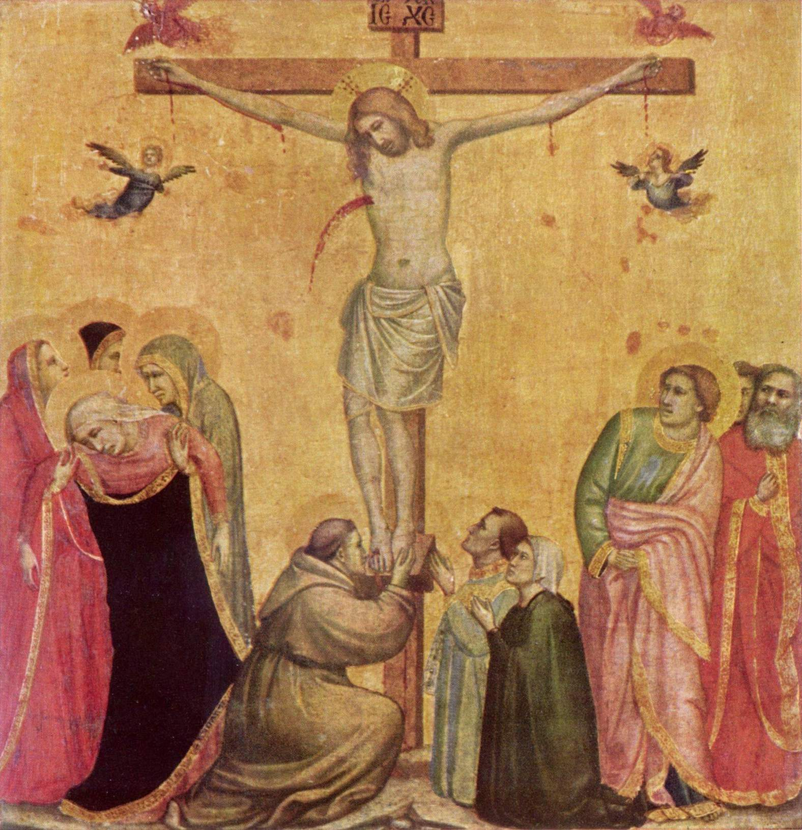 3 altar panels